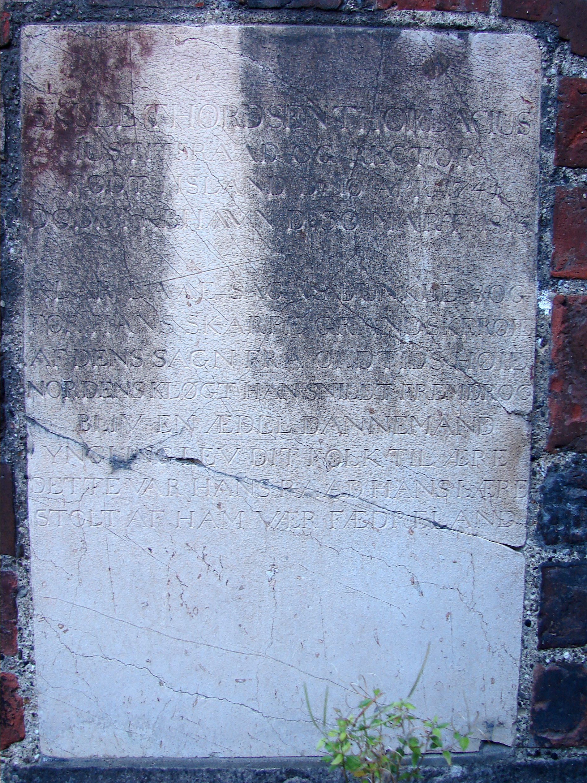 Gravminde over SKULE THORDSEN THORLACIUS, JUSTIETSRAAD OG RECTOR, FØDT I ISLAND D. 10. APR. 1741, DØDE I KBHAVN D. 30 MART 1815 ...